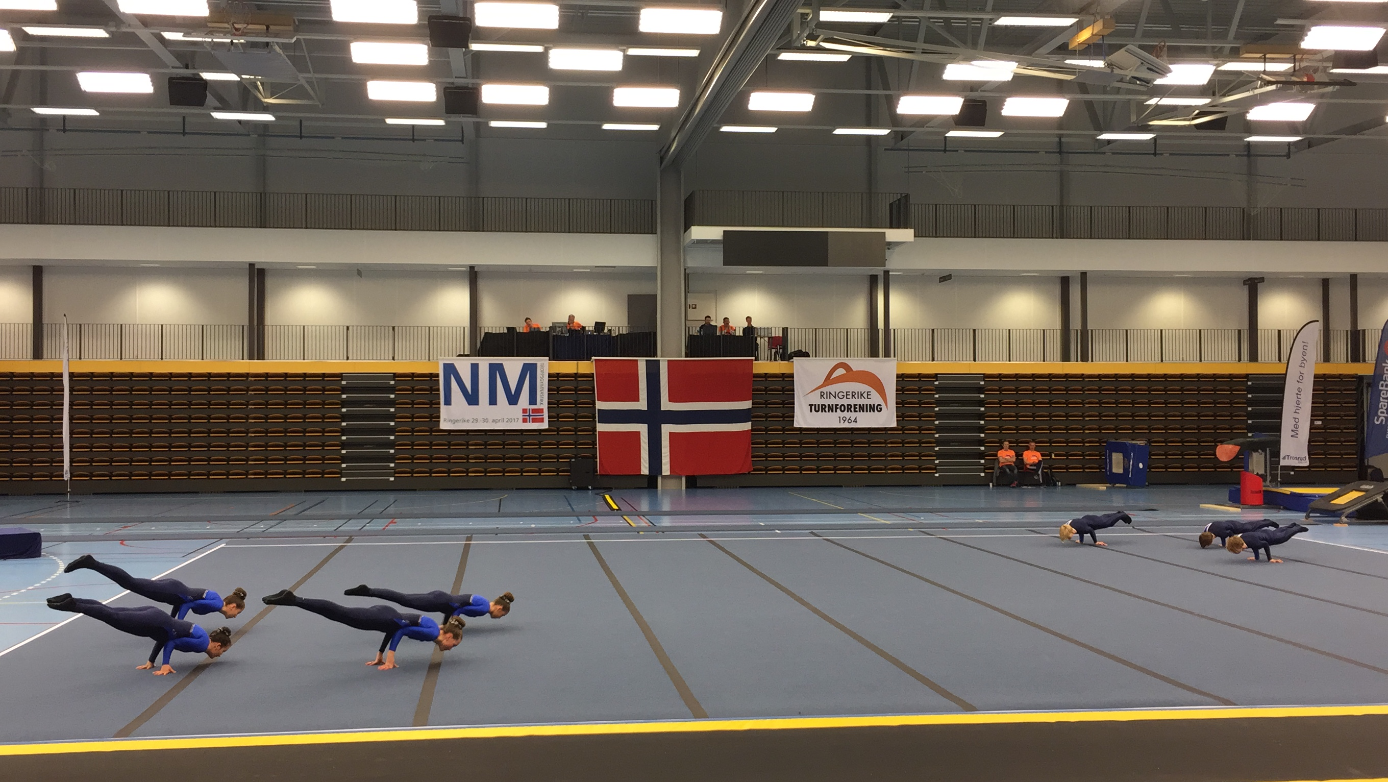 J-NM troppsturn 2017 Ringerike - Ringerike Turn mix frittstående